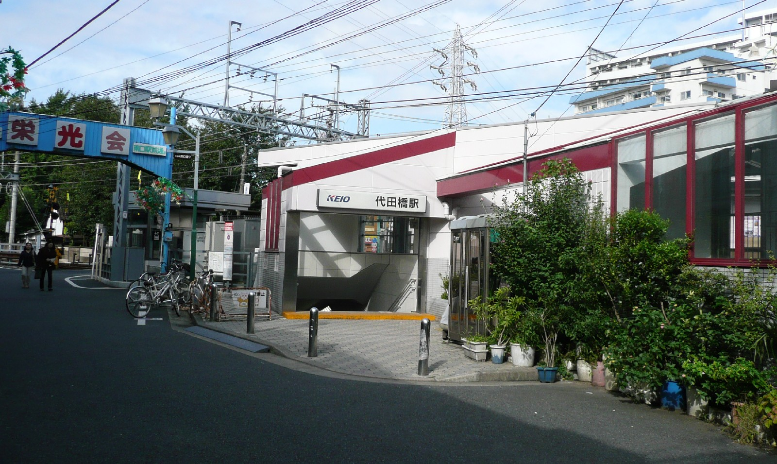 代田橋駅南口